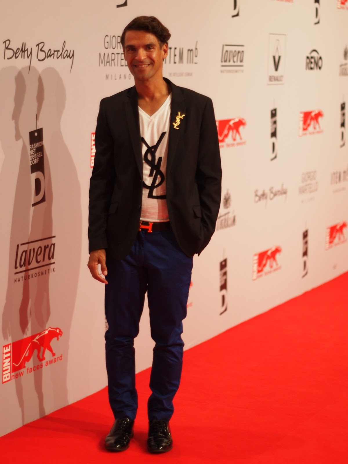 Michael Dierks auf dem roten Teppich des Bunte New Faces Awards